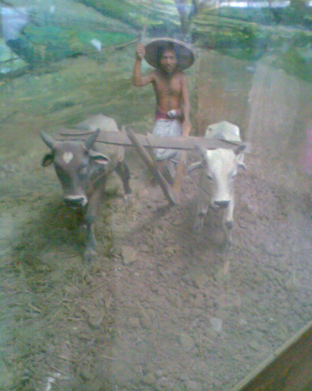 লাঙল, কৃষি যন্ত্র।